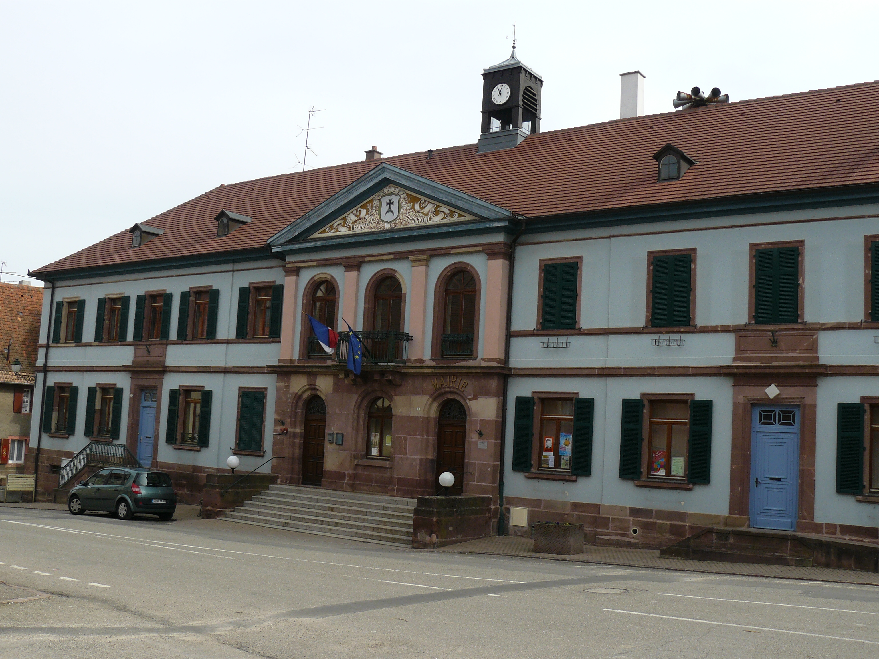 Mairie et presbytère de Pfaffenheim